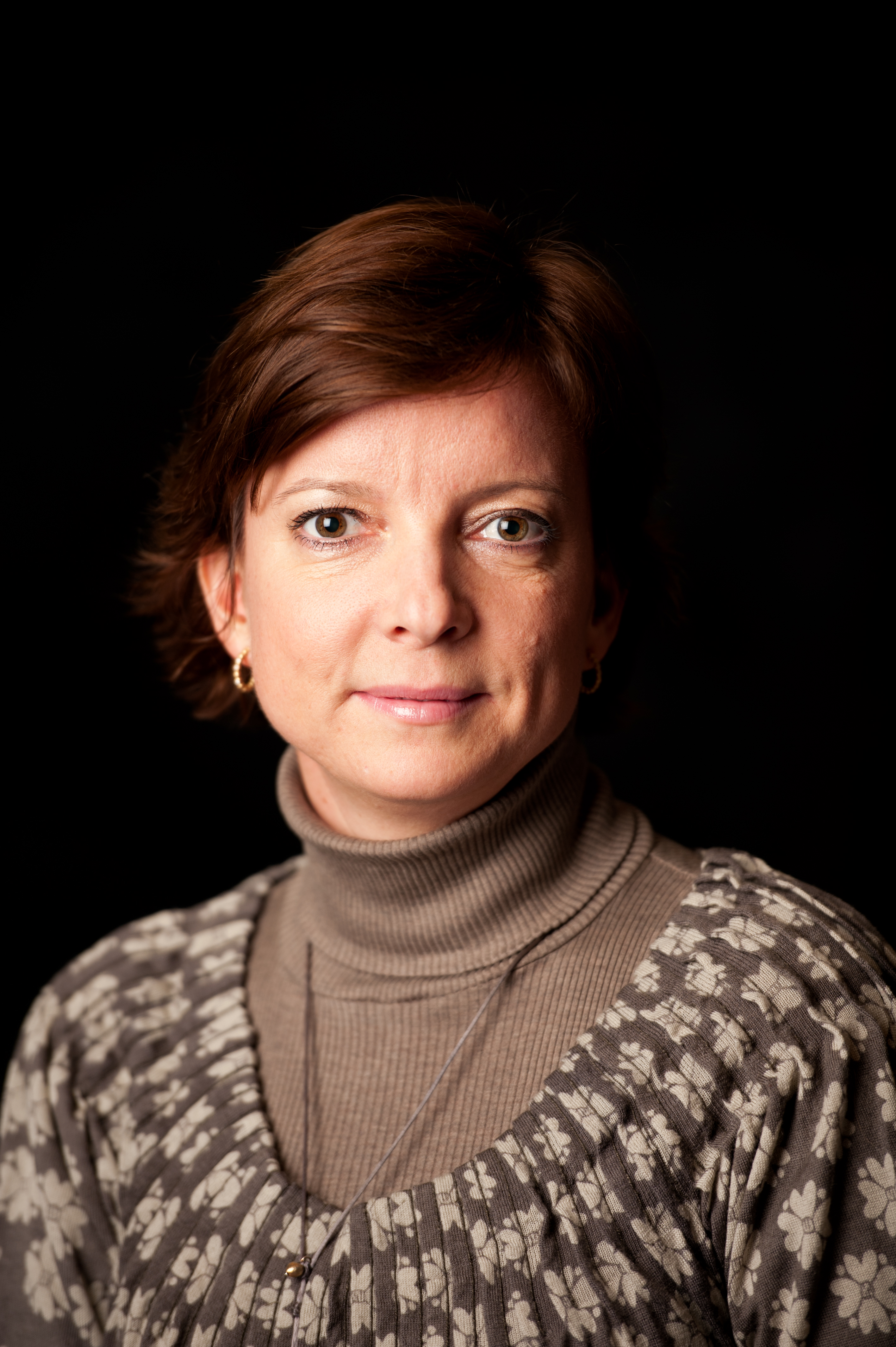 Karen Ellemann miljøminister, minister for nordisk samarbejde Danmark.